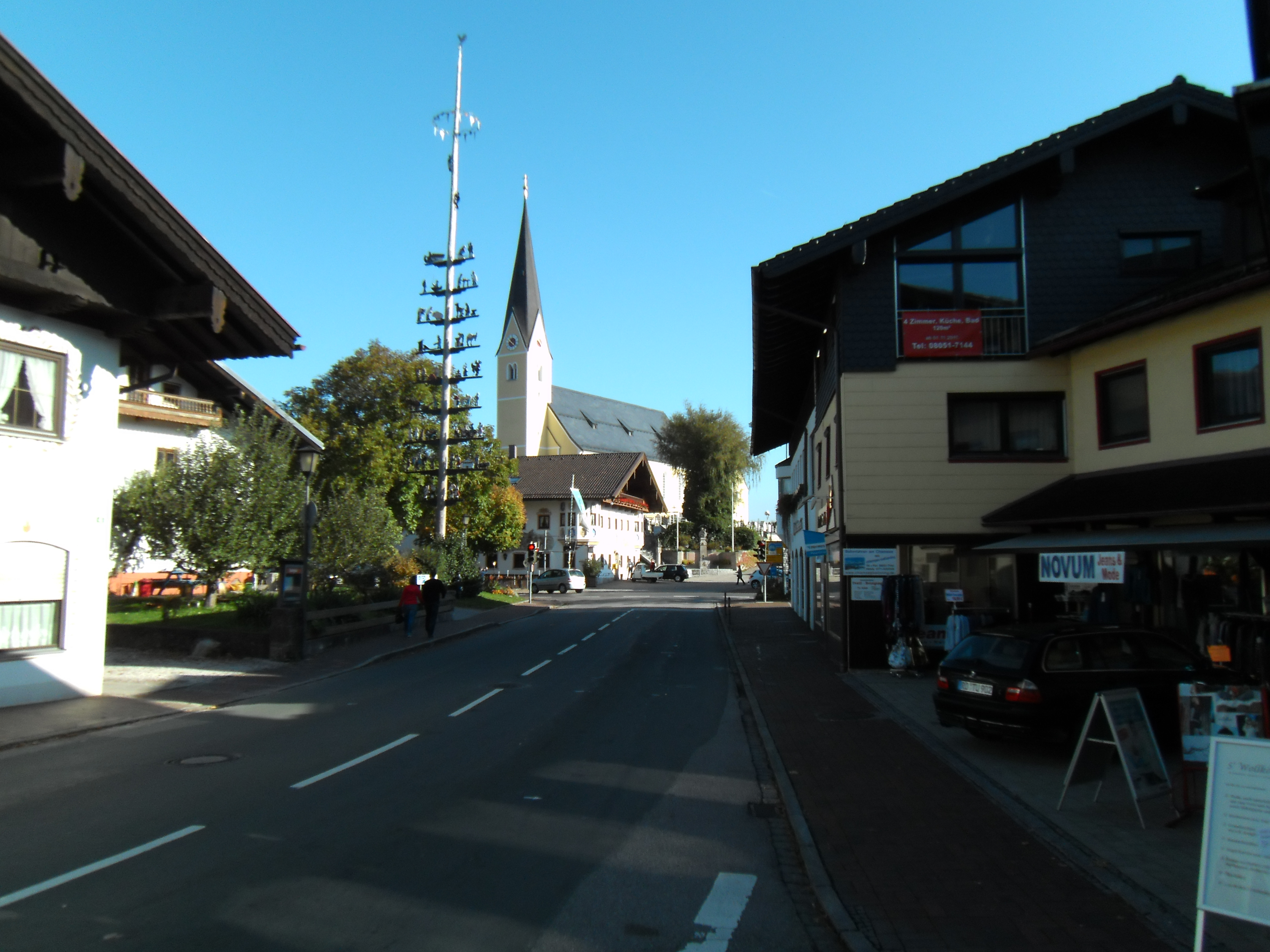 Bernau am Chiemsee. Im Hintergrund die Kirche St. Laurentius, links davor die Traditionsgasstätte Zum alten Wirt.